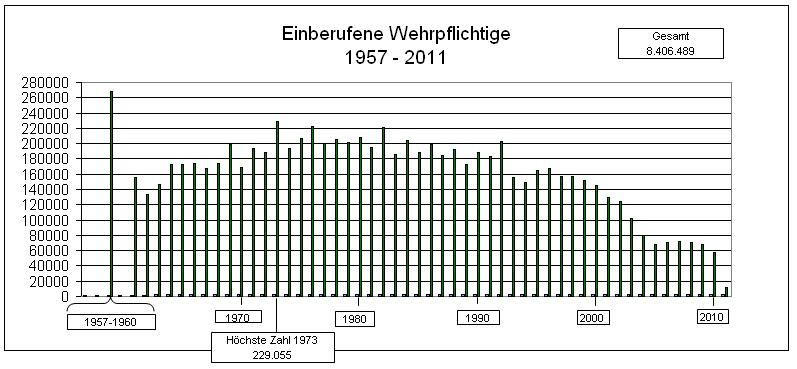 Grafik: Zur Bundeswehr einberufene Wehrpflichtige 1957 bis 2011